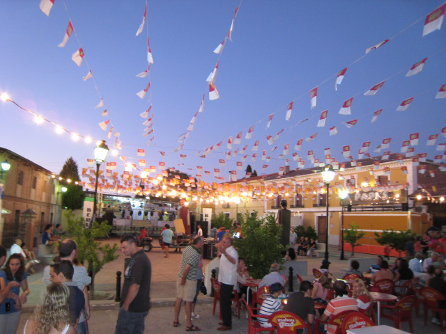 La plaza del pueblo en fiestas